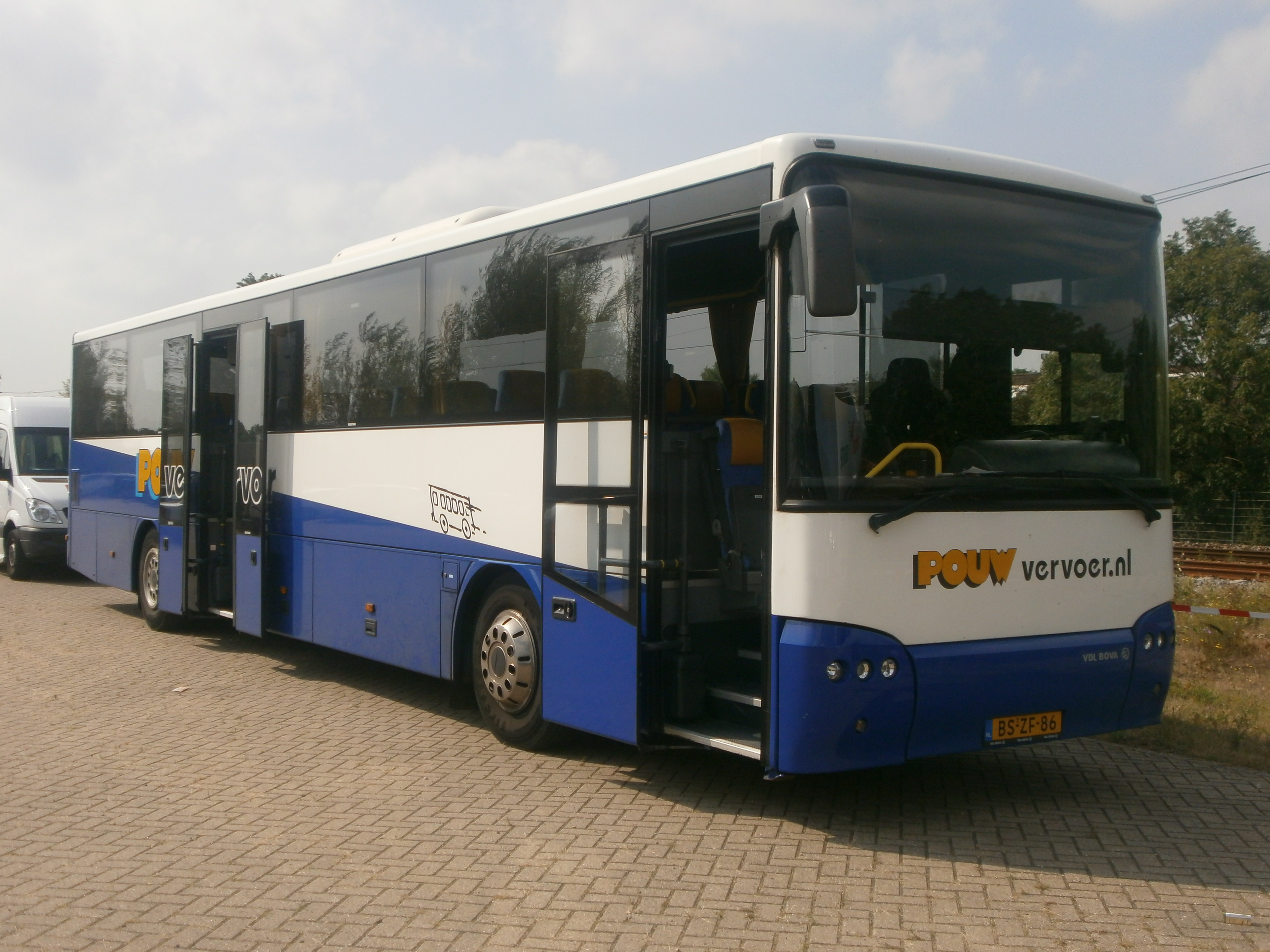 VDL Lexio van Pouw Vervoer